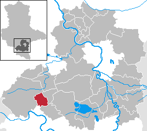 Barnstädt in Saxony-Anhalt - Saalekreis